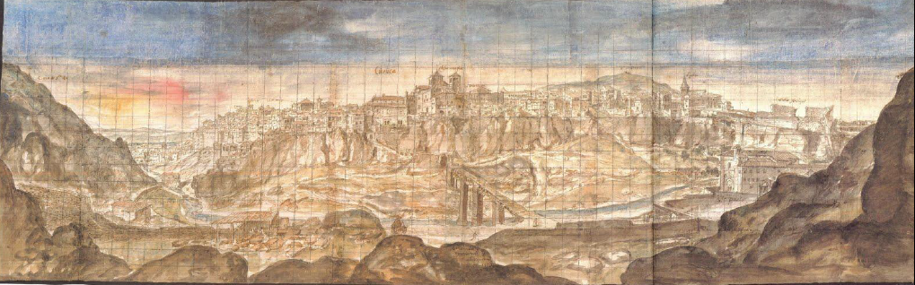 Dibujo de una vista general de Cuenca, realizado por Anthonis van den Wijngaerde en 1565.